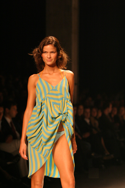 SPRING/SUMMER 2005-Porto, Portugal